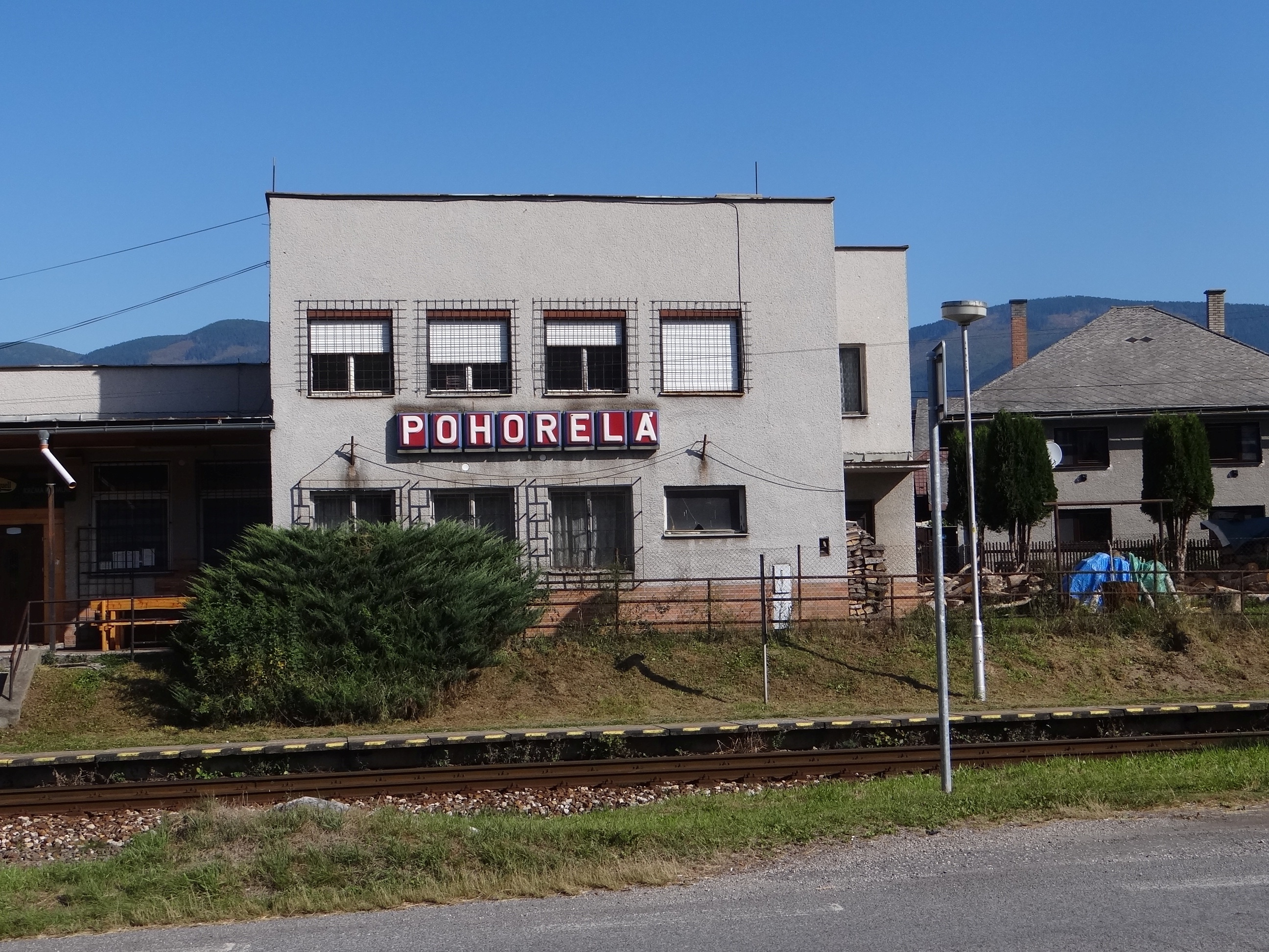 Pohorelá